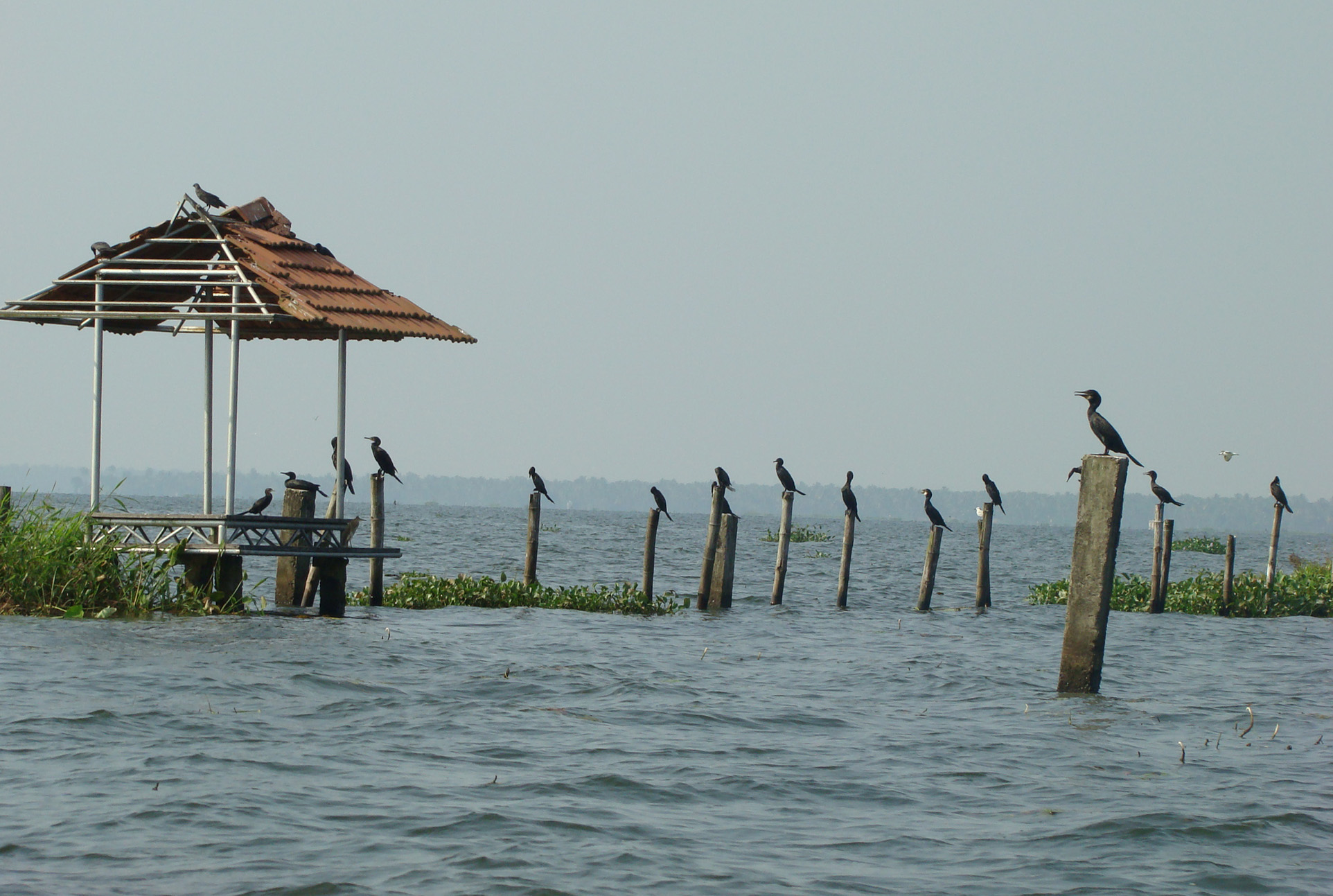 Kumarakam Backwaters, Kerala, India